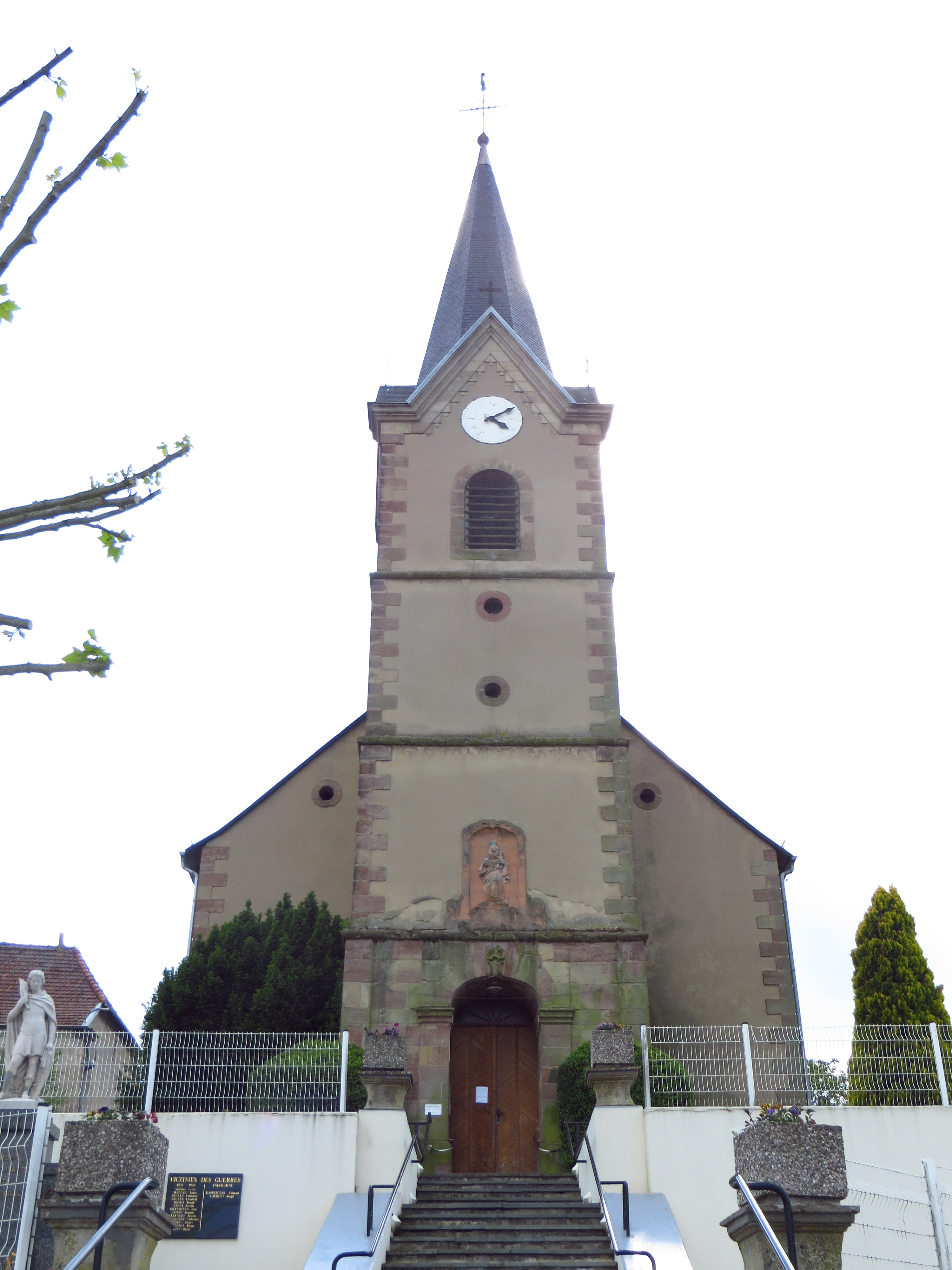 Valmont eglise